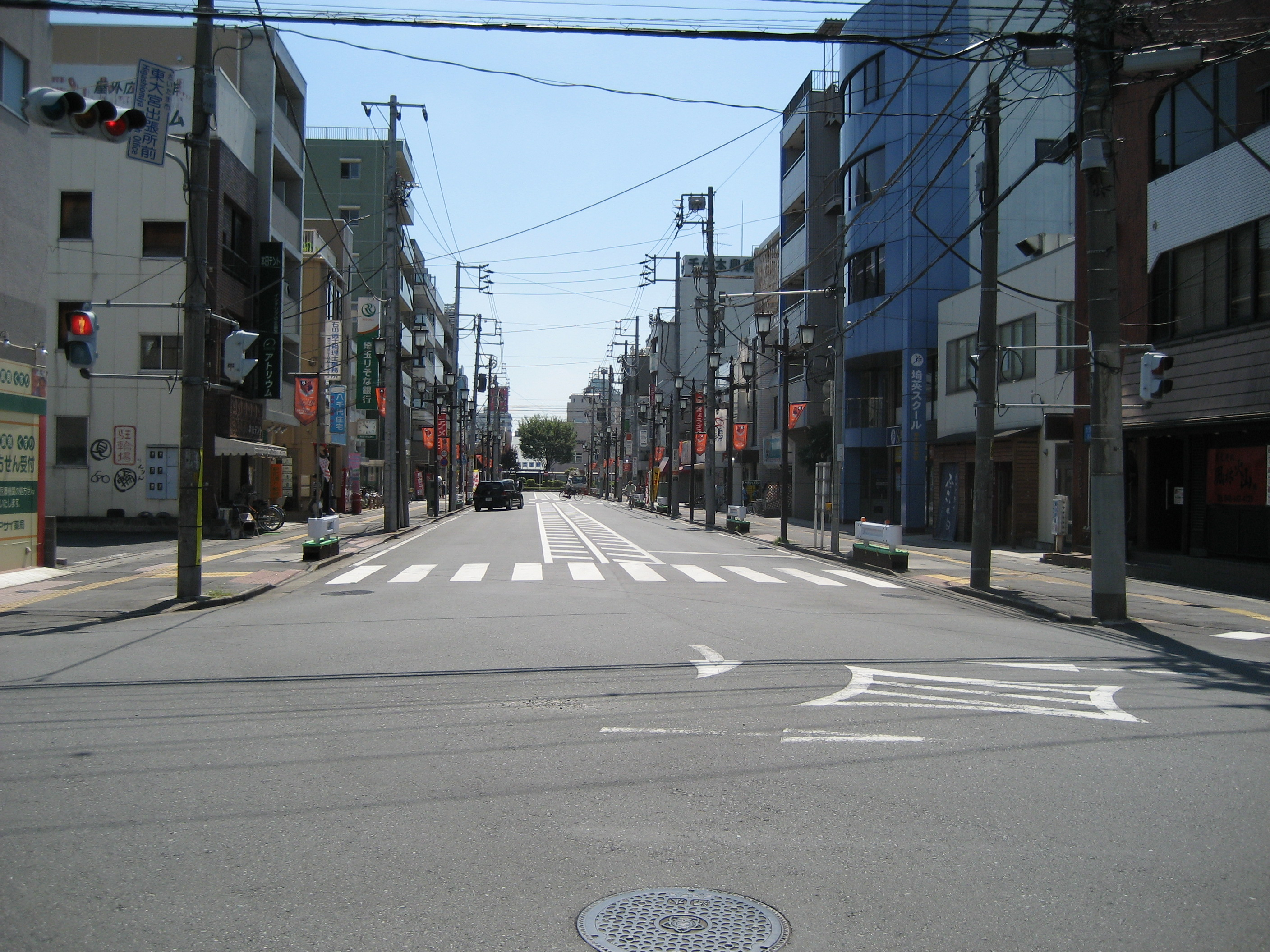 埼玉県道144号線 さいたま市見沼区役所東大宮出張所付近